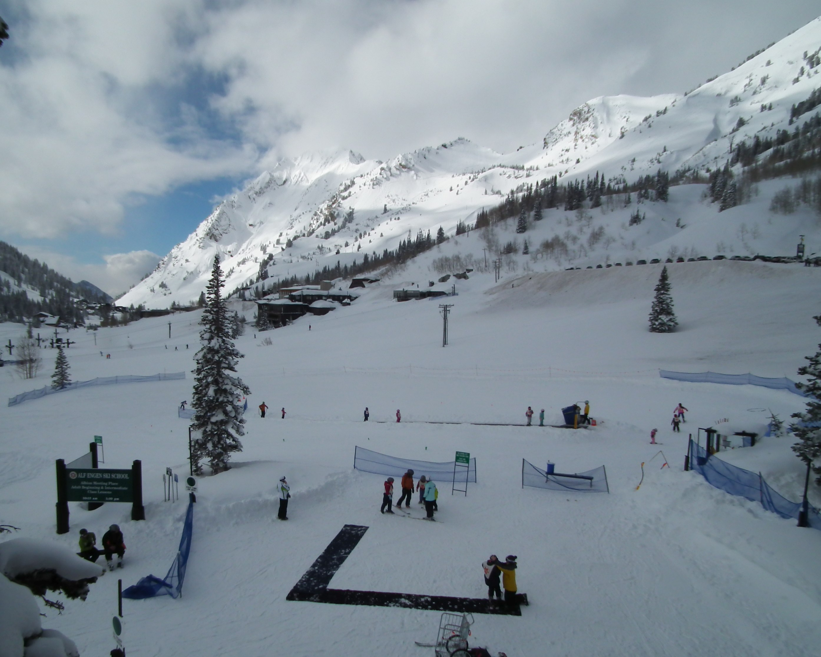 Children taking skiing lessons at Alta Ski Area in Utah.